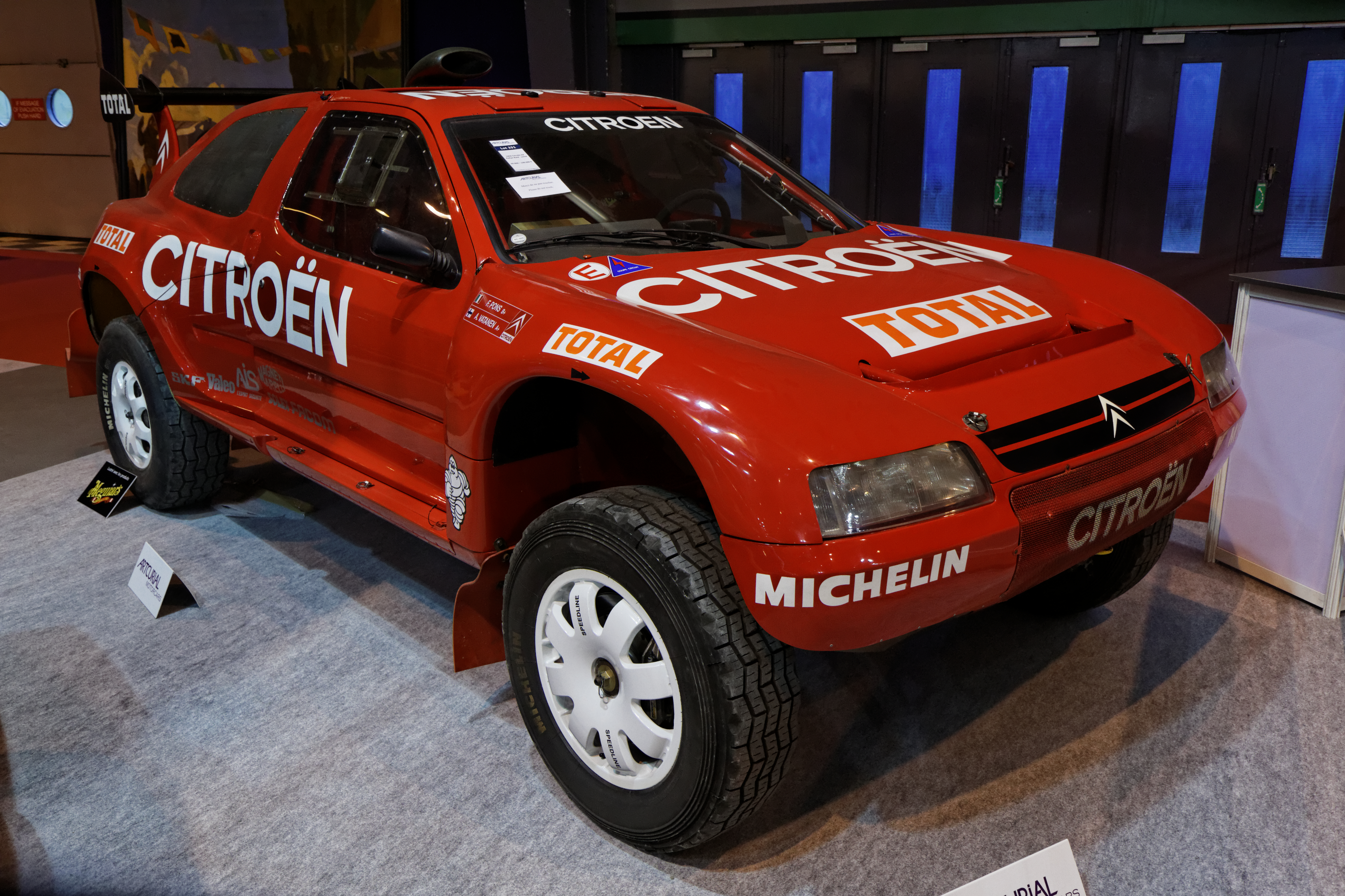 Une Citroën ZX Rallye-Raid équipée usine exposée lors du salon Retromobile 2014